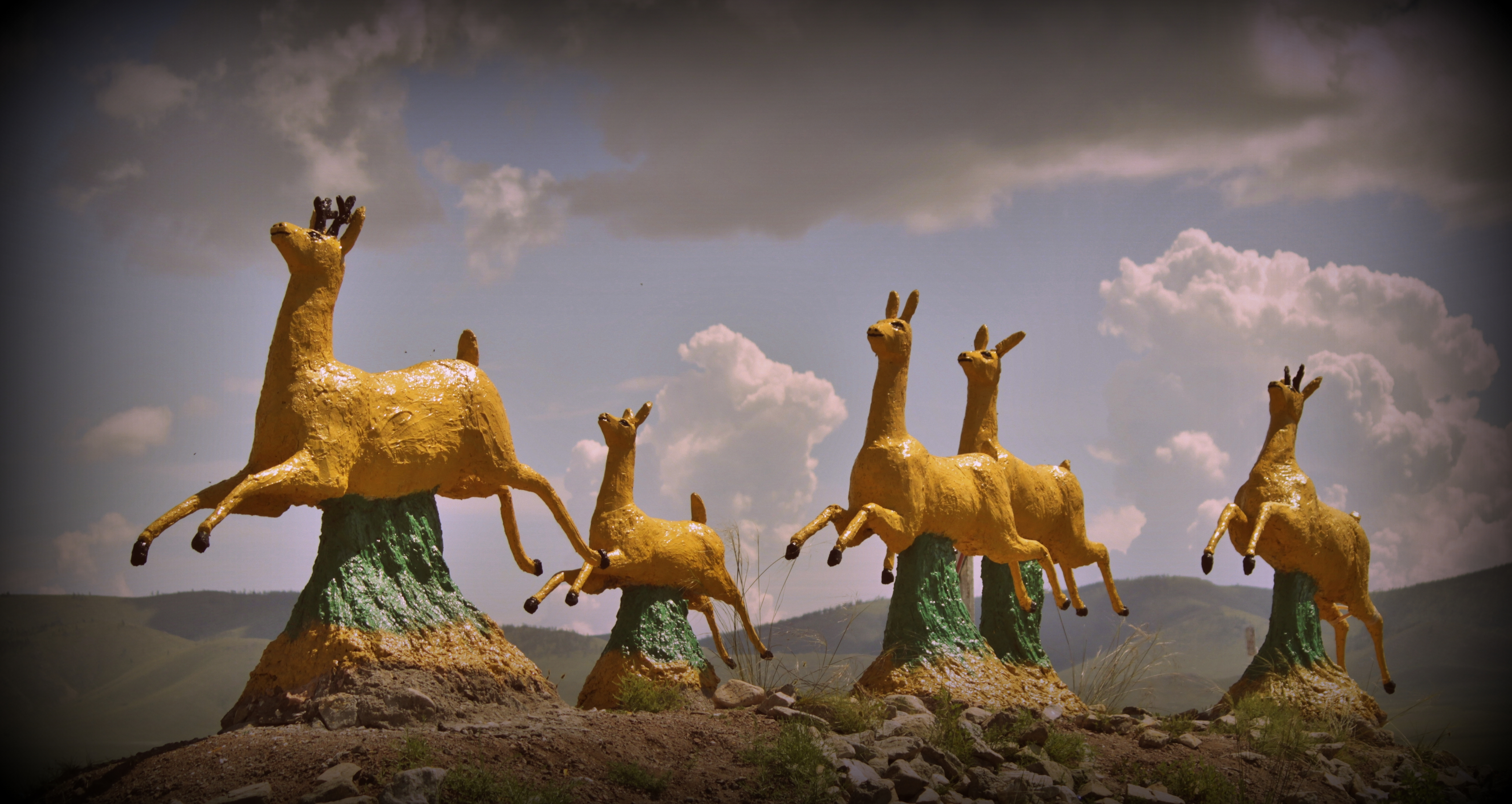 Лани, бегущие на гору Бурин-хан. Скульптор - Геннадий Васильев